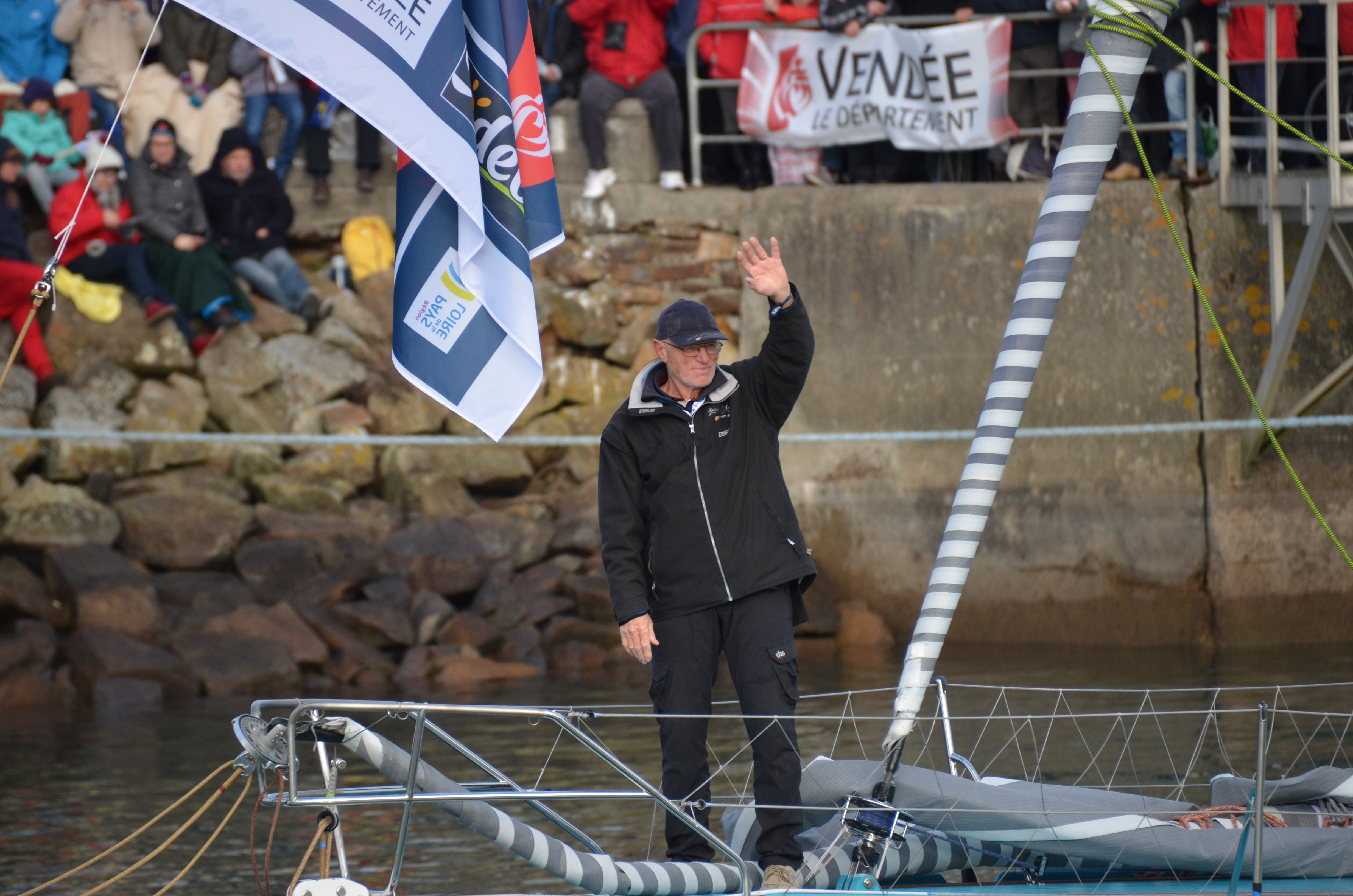 Nandor Fa au départ du Vendée Globe 2016-2017